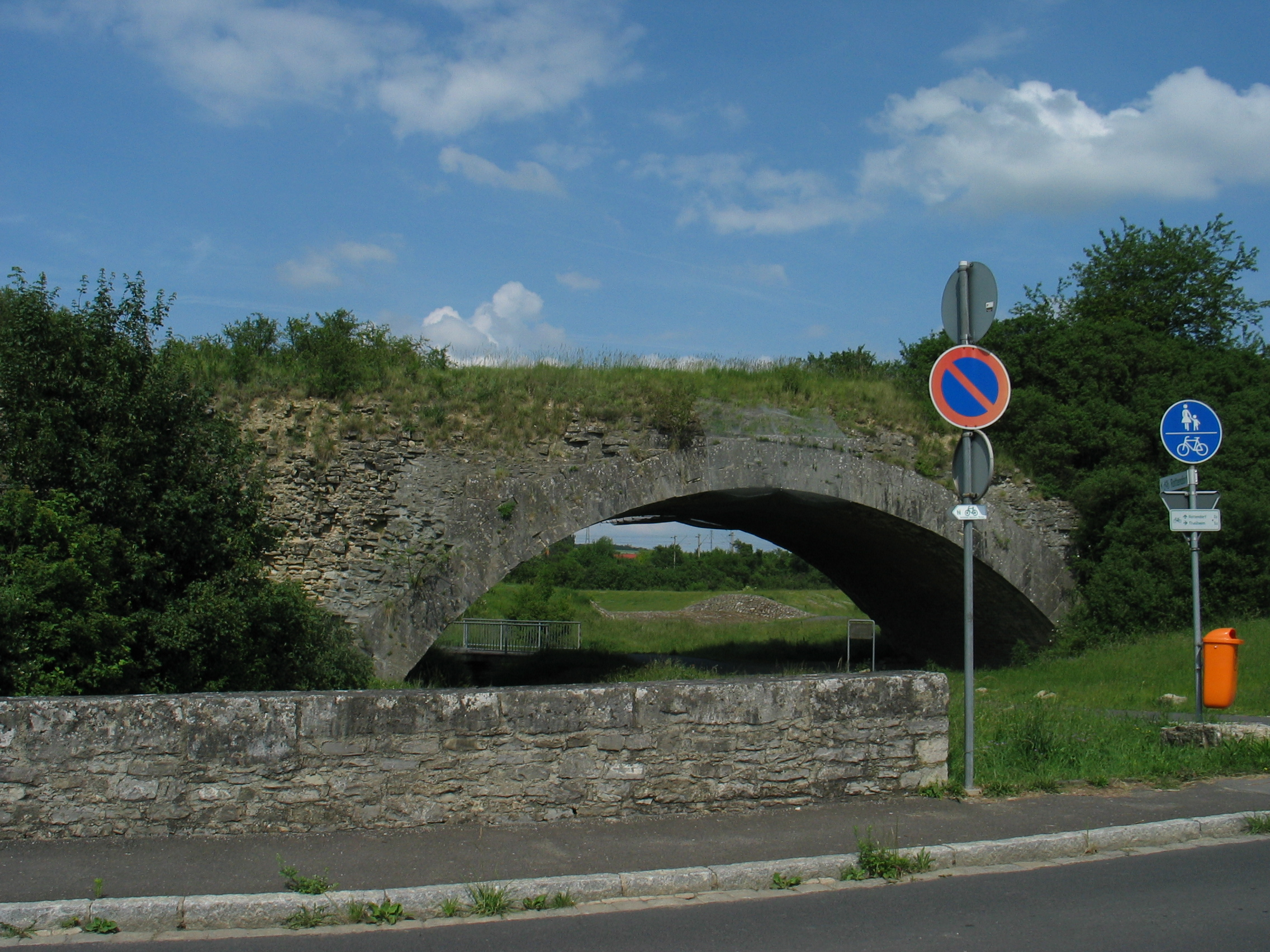 Die Römerbrücke in Gerbrunn (bei Würzburg)